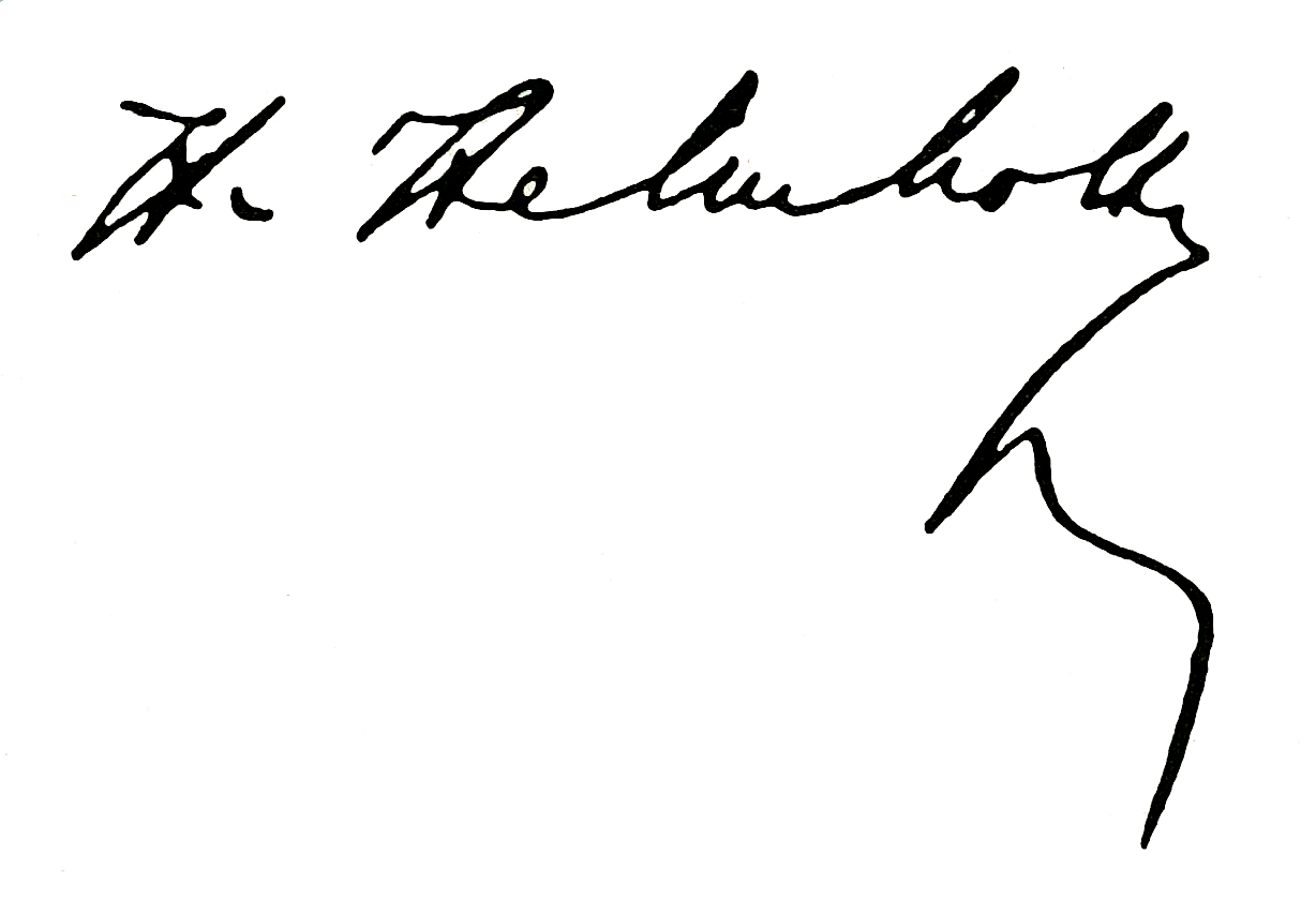 Signature of Hermann von Helmholtz